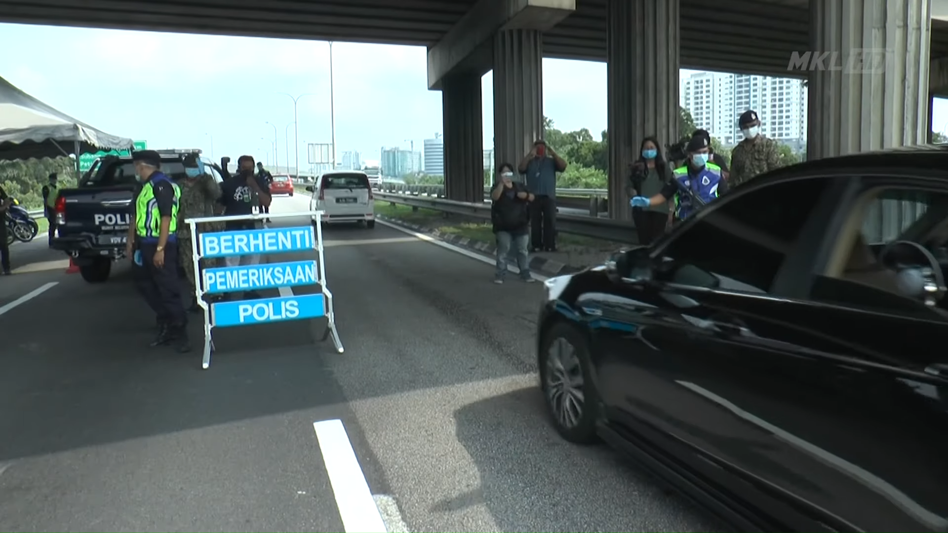 Ops Covid19 Tentera Mula Operasi Bantu Pdrm Di Shah Alam